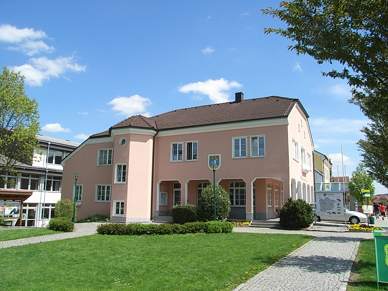 Gemeindeamt Esternberg